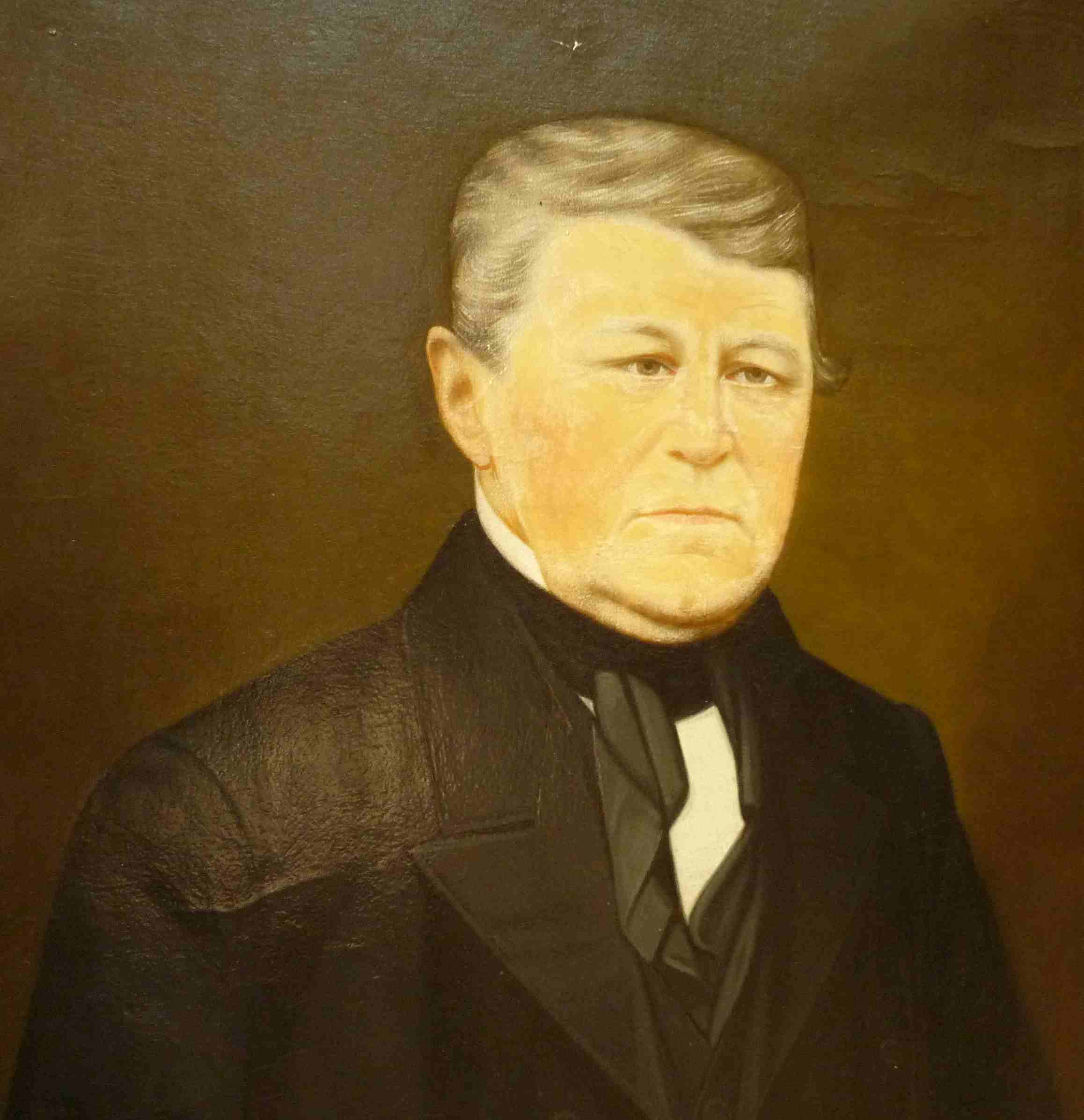 Johannes Wilhelmus van de Mortel (1795-1863) was burgemeester van Deurne van 1850 tot 1854. Het schilderij hangt in het gemeentehuis van Deurne.